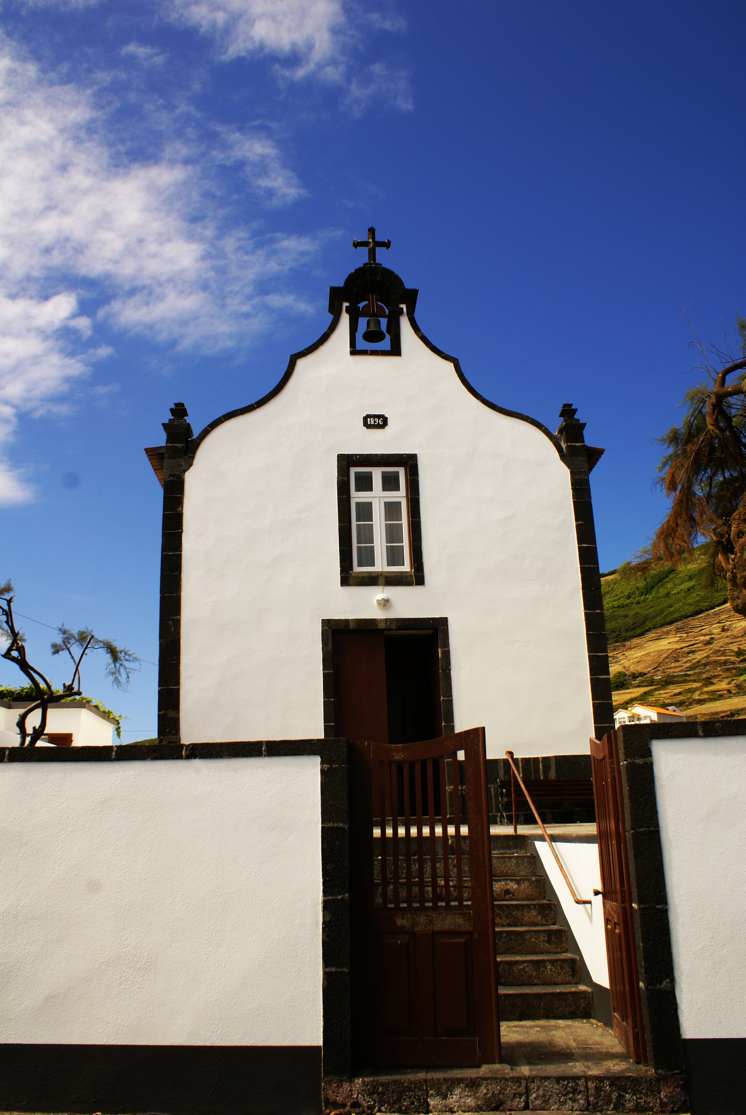 Ermida de Nossa Senhora de Lurdes, fachada, Carapacho, Santa Cruz da Graciosa, ilha graciosa, Açores, Portugal